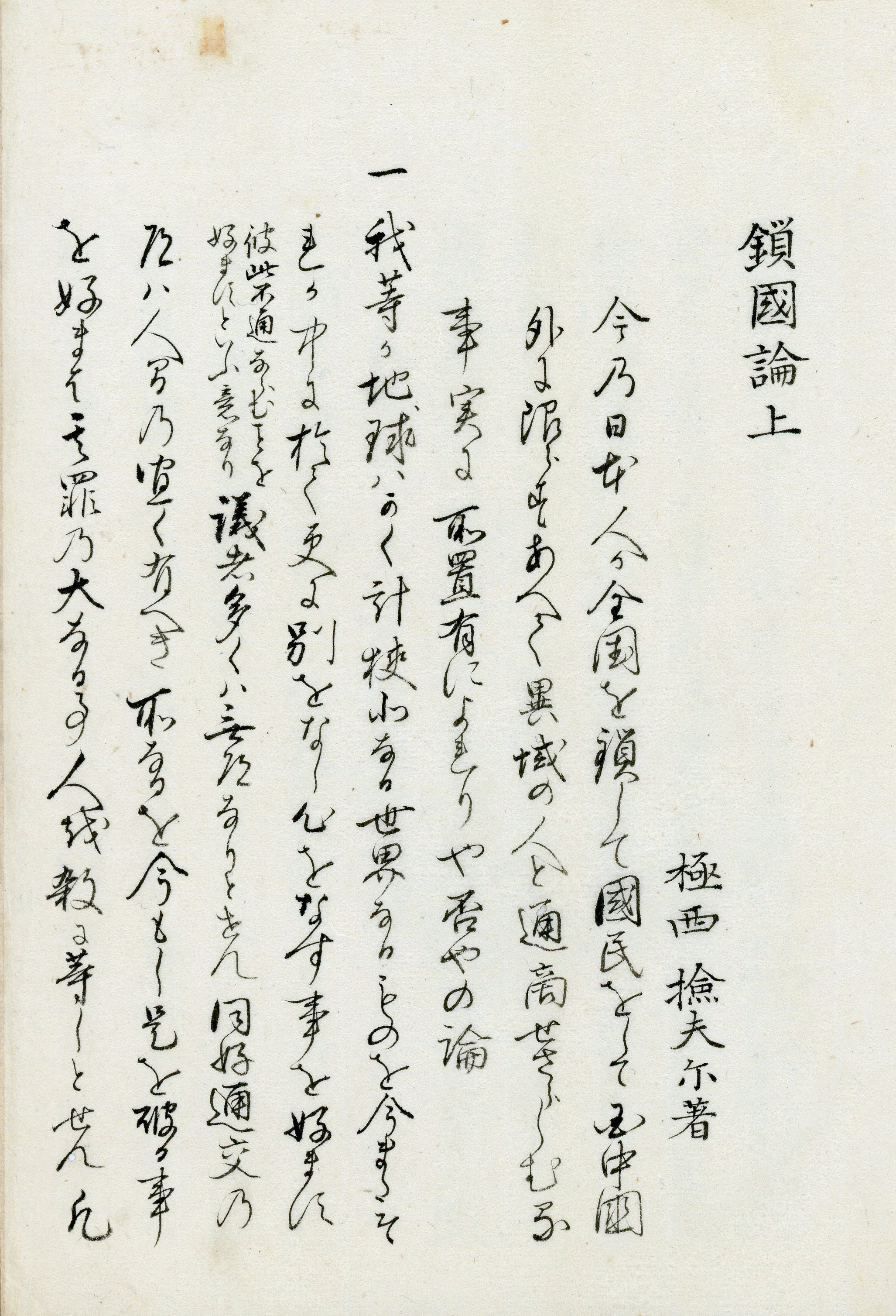 「鎖国論」上巻の内題、ケンペルの名が「検夫尓」と表記されている